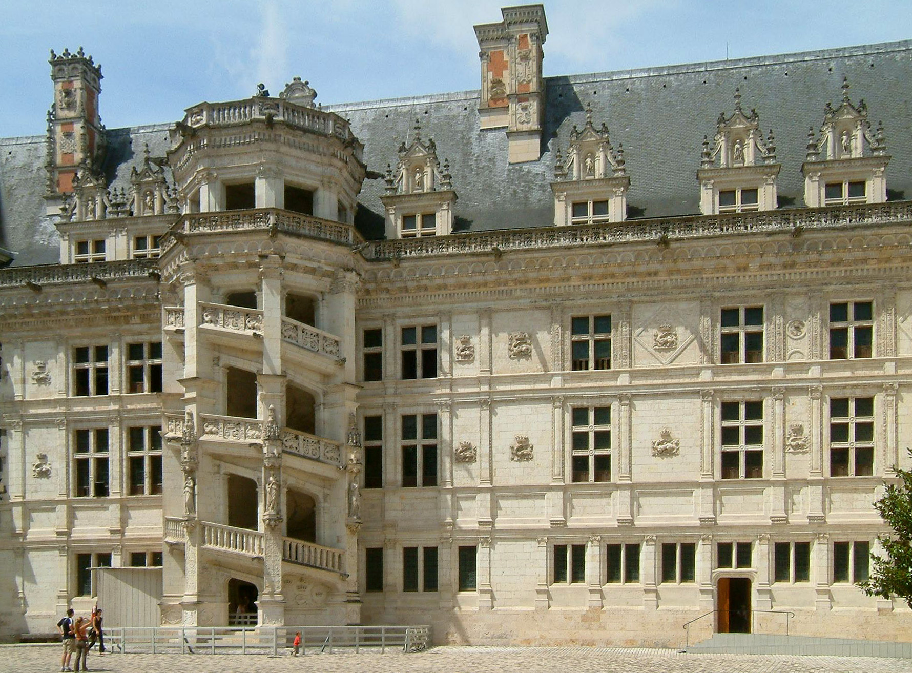 Château de Blois, Blois, FRANCE